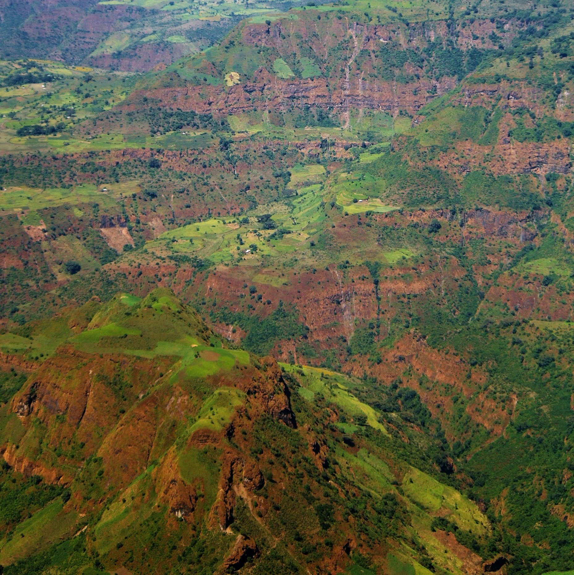 Semien Mountains in Ethiopia